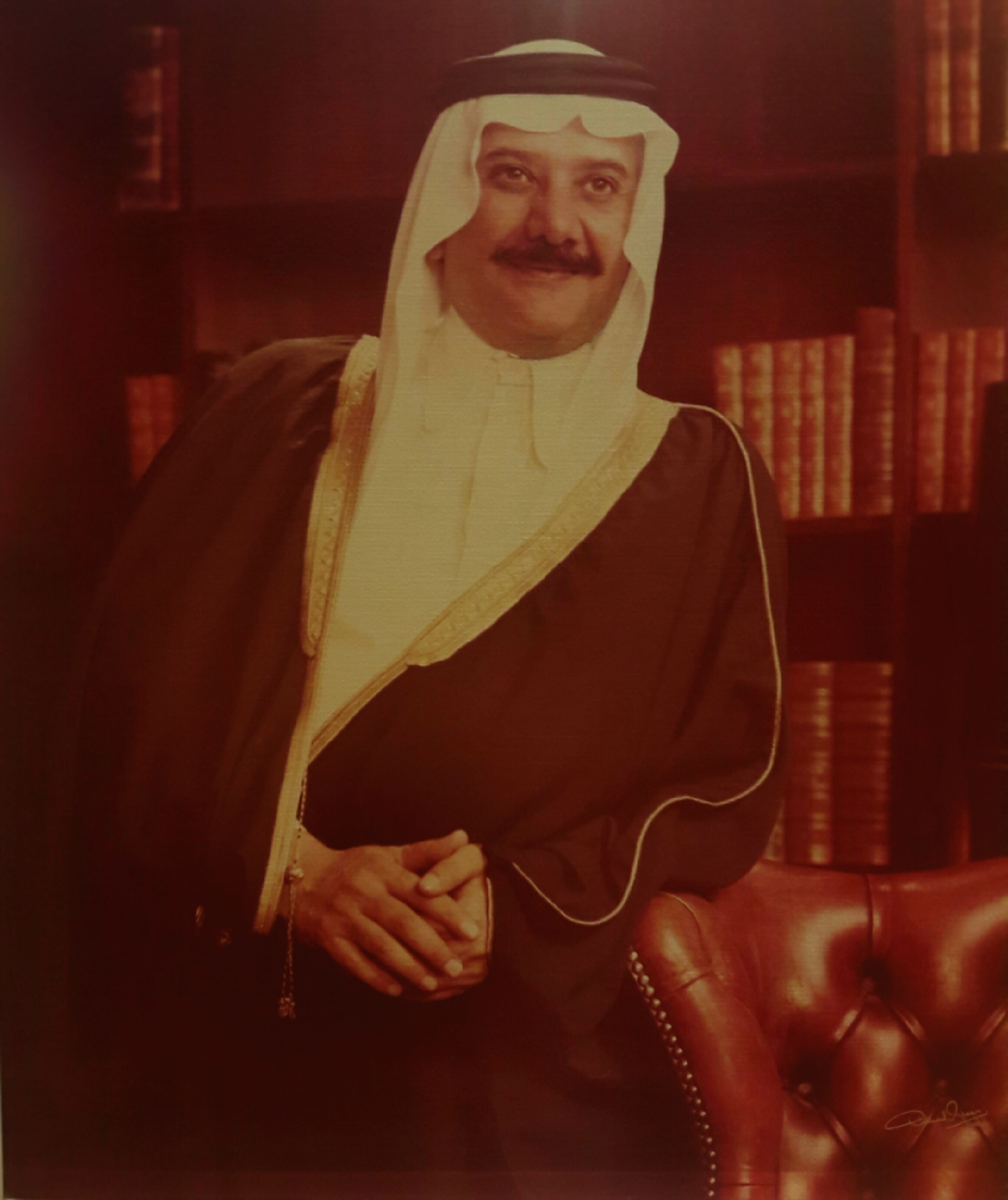 معالي الشيخ فيصل بن محمد الشهيل